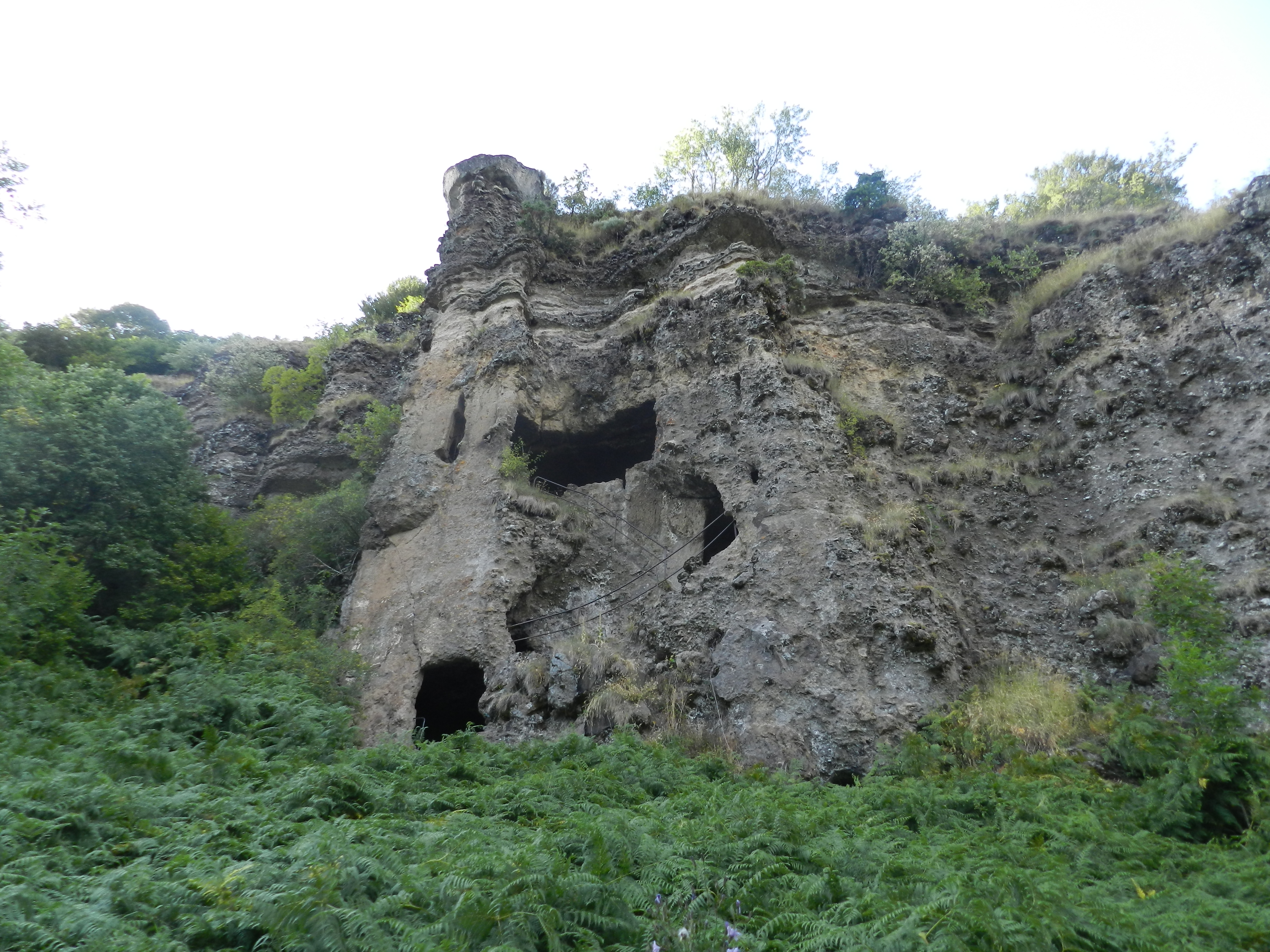 Habitats troglodytes médiévaux habités jusqu'au début du XXè siècle. Avant d'accueillir de nombreux autres ermites, la grotte fut habitée pendant plusieurs années par Saint-Calupan, un des principaux évangélisateurs de Haute Auvergne.